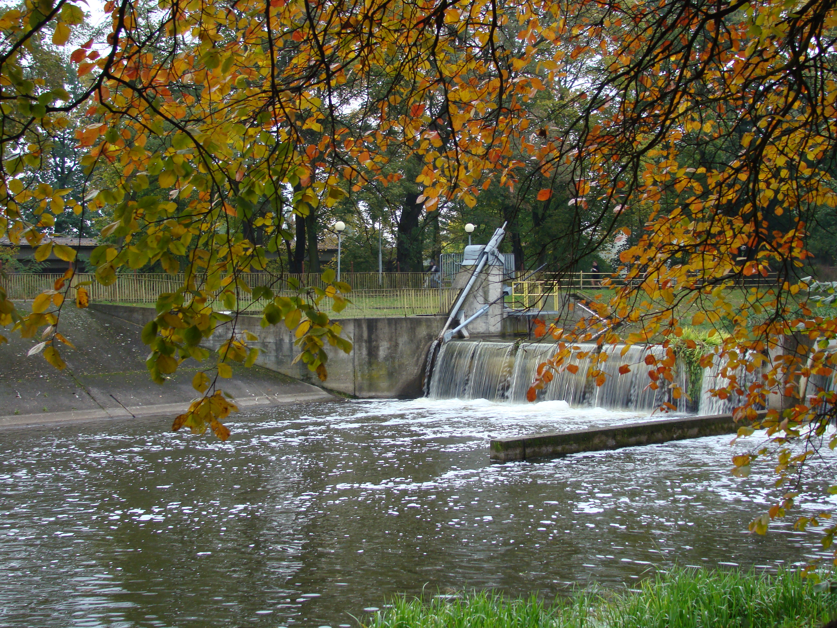 JESIENNY PARK 21 KALISZ